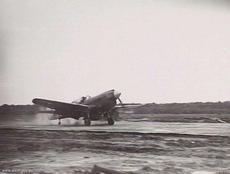 A No. 75 Squadron RAAF P-40 Kittyhawk landing at Tarakan